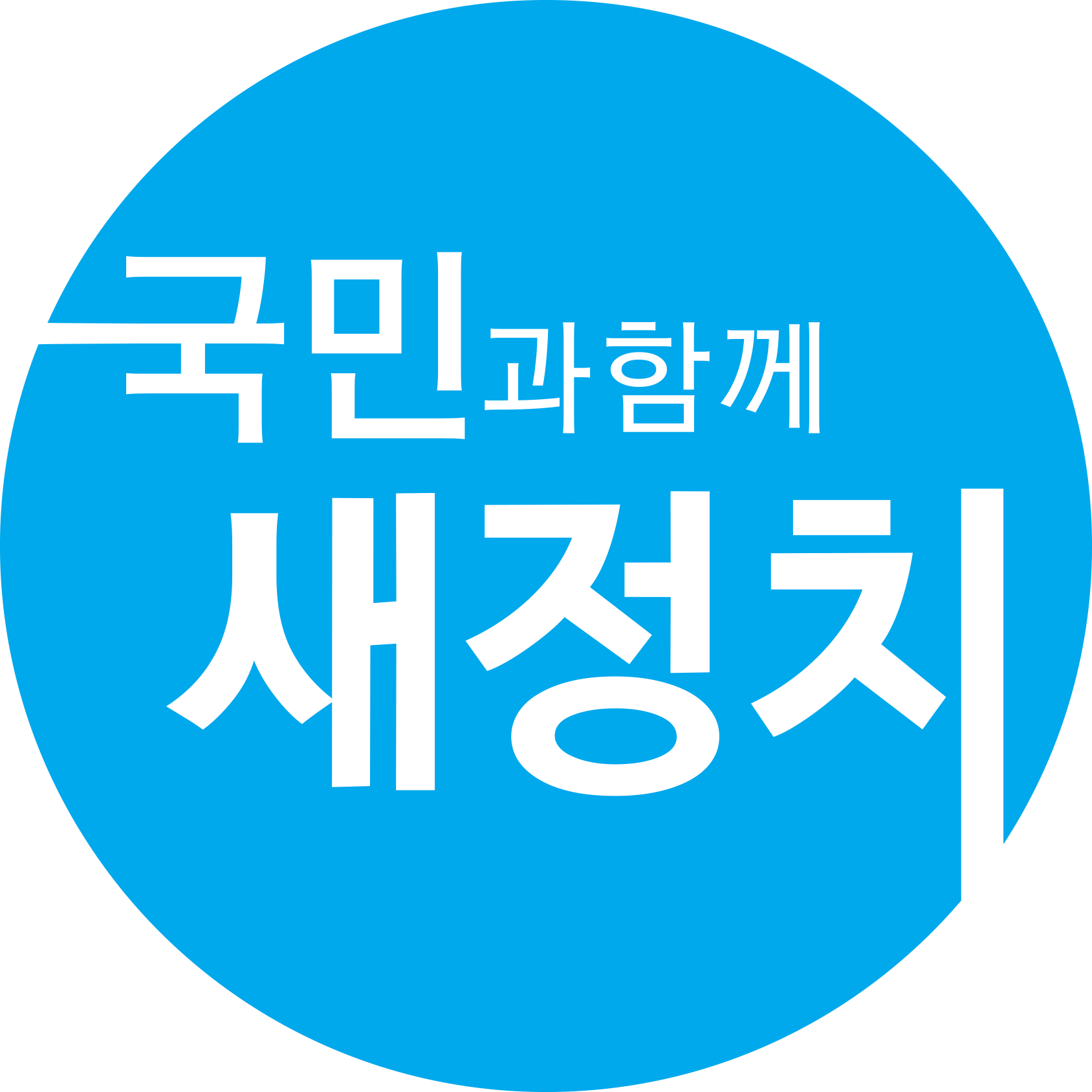 새정치연합의 로고